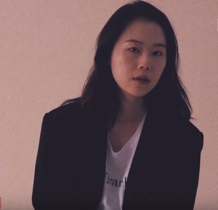 배우 김새벽만의 스타일대로 영화 '달콤한 인생' 속 대사를 연기했어요. 연기에 있어서 성별의 차이는 전혀 중요하지 않다는 것을 보여주는 ‘젠더프리’ 영상을 함께 한 김새벽.